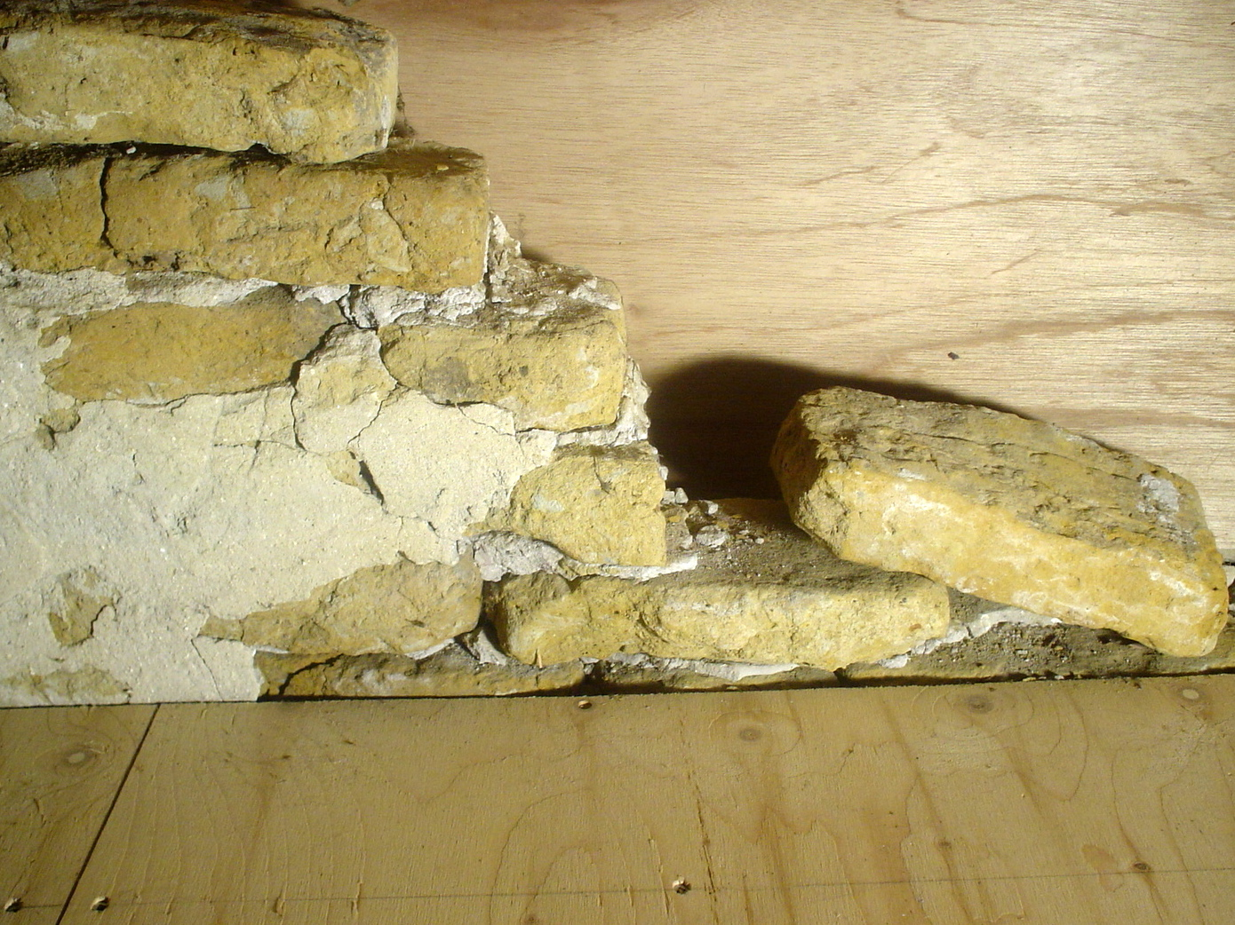 De van zonstenen gebouwde muur komt boven de zoldervloer uit.